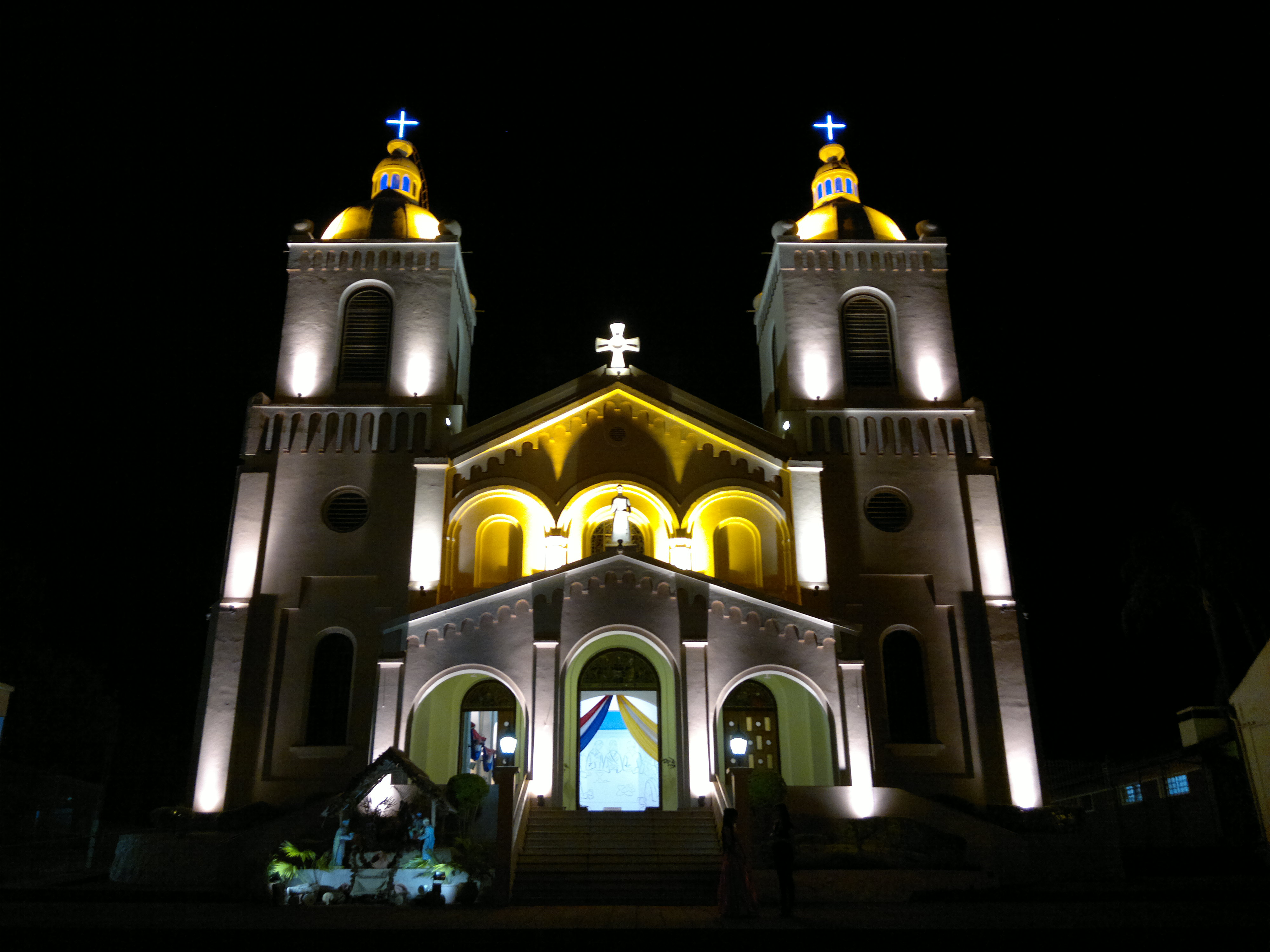 Catedral de Encarnación